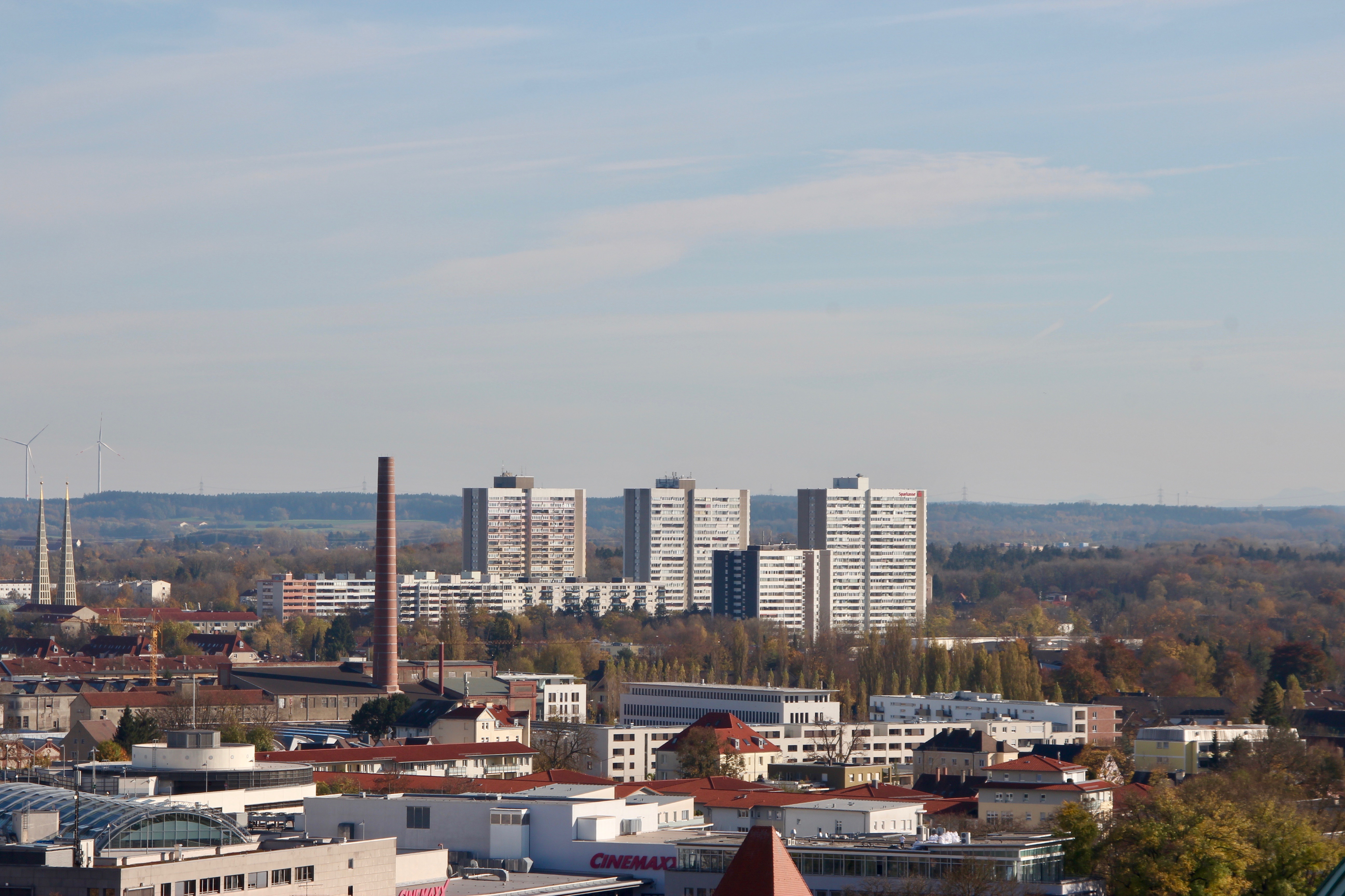 Das Bild zeigt den Blick vom Perlachturm in Augsburg in Richtung Südosten. Im Vordergrund ist teilweise noch die City Galerie und die Spitze des Vogeltors zu erkennen. Am linken Rand sind die Türme der Don-Bosco-Kirche zu sehen, etwas weiter rechts der Schornstein der Augsburger Kammgarn-Spinnerei. Im Hintergrund ragen die drei Hochhäuser des Schwabencenters in die Höhe.